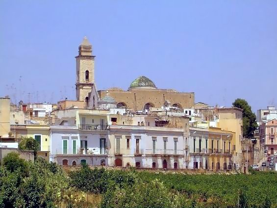 presa da bitonto/fotoblog Chiesa di San Francesco in Bitonto.